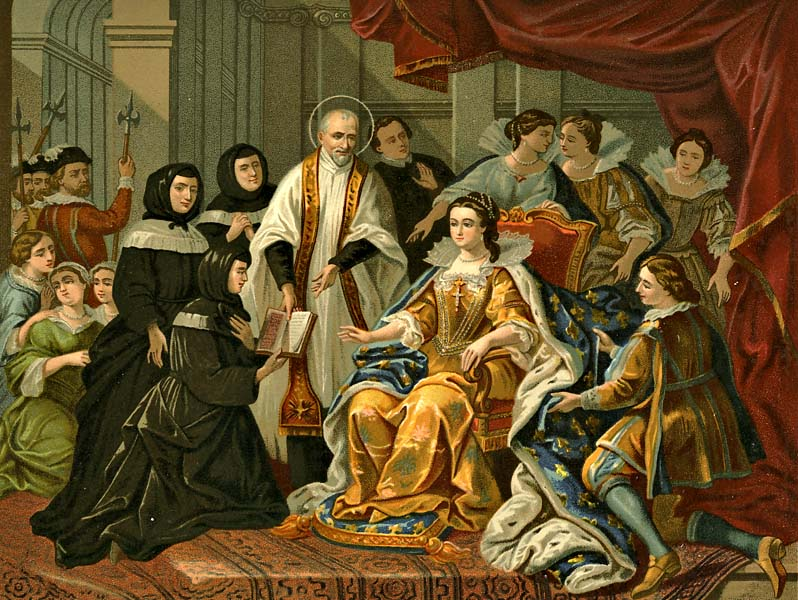 Saint Vincent présente les premières filles de la charité à la reine Anne d'Autriche. Tableau de frère André, religieux dominicain, dans l'église de sainte Marguerite à Paris, XVIIIe siècle. À droite, Anne d'Autriche est assise. Saint-Vincent, debout, présente à la reine une religieuse agenouillée, peut-être Mlle Le Gras, qui tient à la main un livre ouvert, les constitutions des filles de la charité. Reproduction issue de : Arthur Loth, Saint Vincent et sa mision locale, Paris, Dumoulin, 1880.